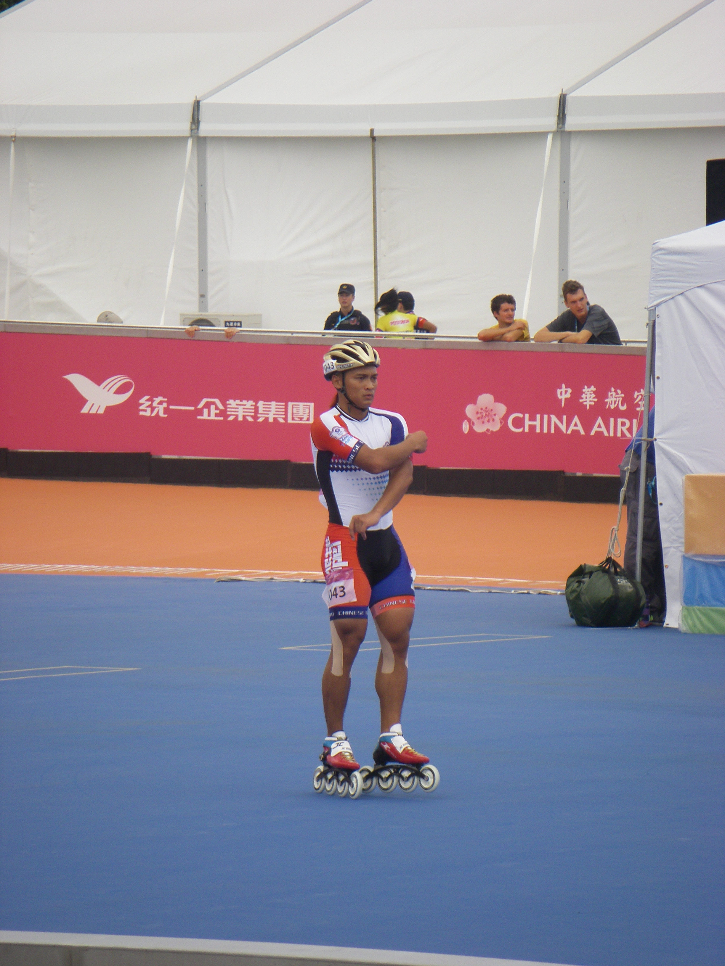 中文（台灣）: 在2017年夏季世界大學運動會滑輪溜冰比賽出賽的台灣滑輪溜冰運動員宋青陽